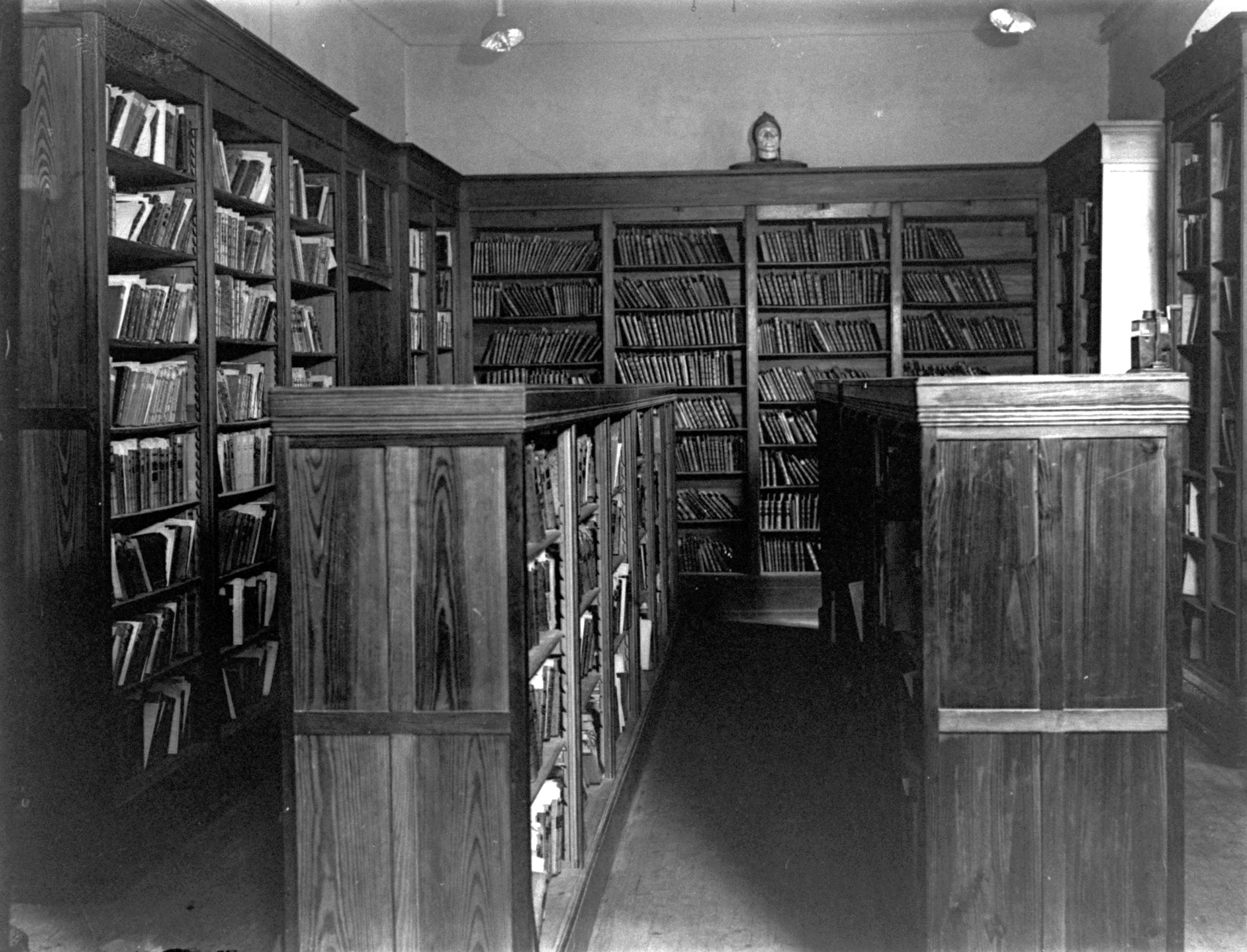 Biblioteca Circulante del Ateneo Obrero de Gijón. 1934 (Constantino Suárez. Muséu del Pueblu d'Asturies)